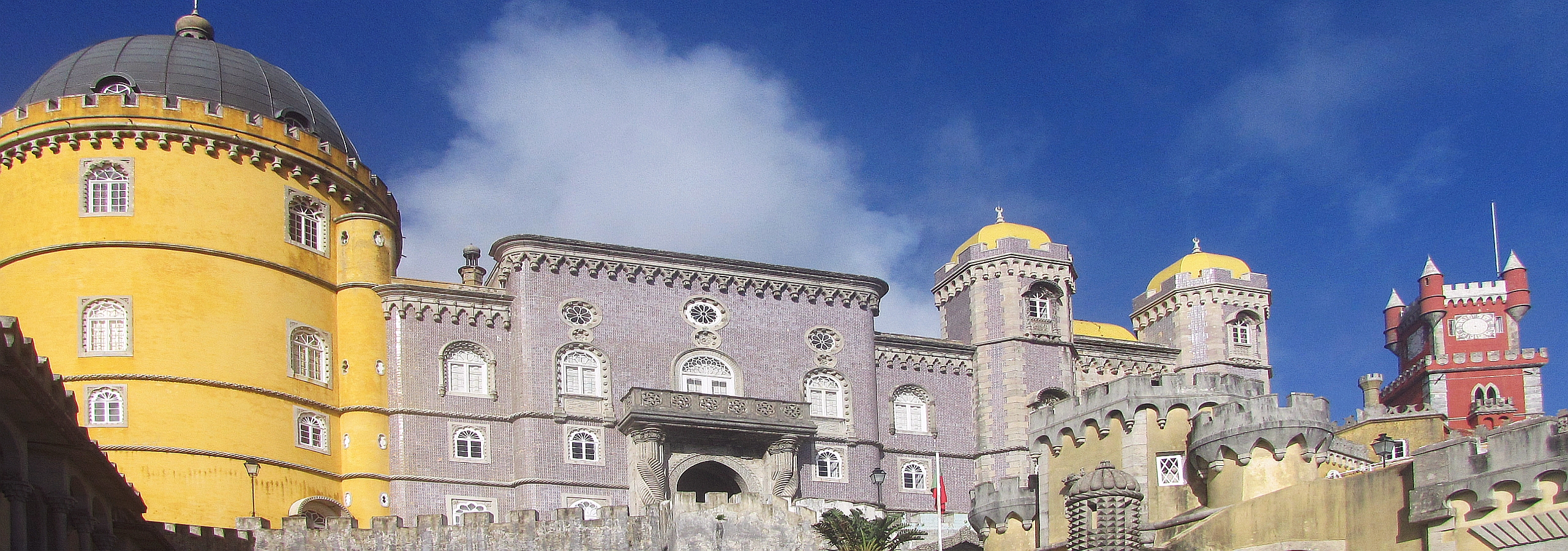 Typische Farben Palácio Nacional da Pena 1840 Ferdinand II in Sintra nördl Lissabon Portugal Foto Wolfgang Pehlemann DSC09526